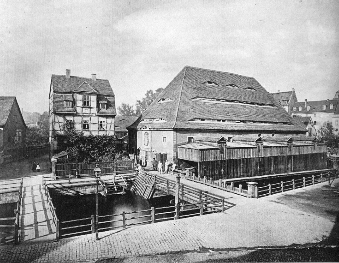 Leipzig: Angermühle am Ranstädter Steinweg 77 im Jahre 1875.